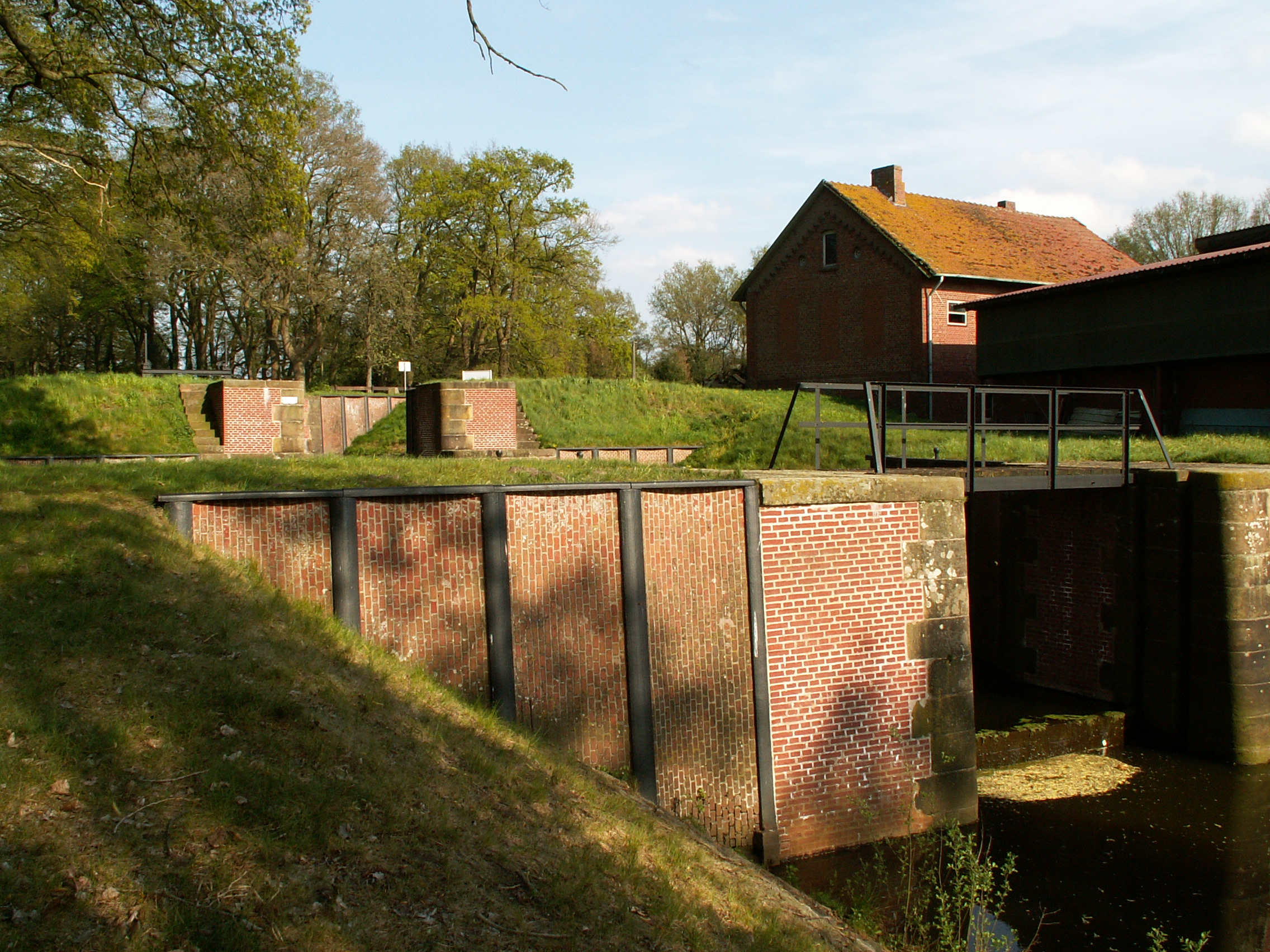 Koppelschleuse Ems-Vechte-Kanal. Nordhorn. Linksemsisches Kanalnetz. Blickrichtung Ost. Looking E.